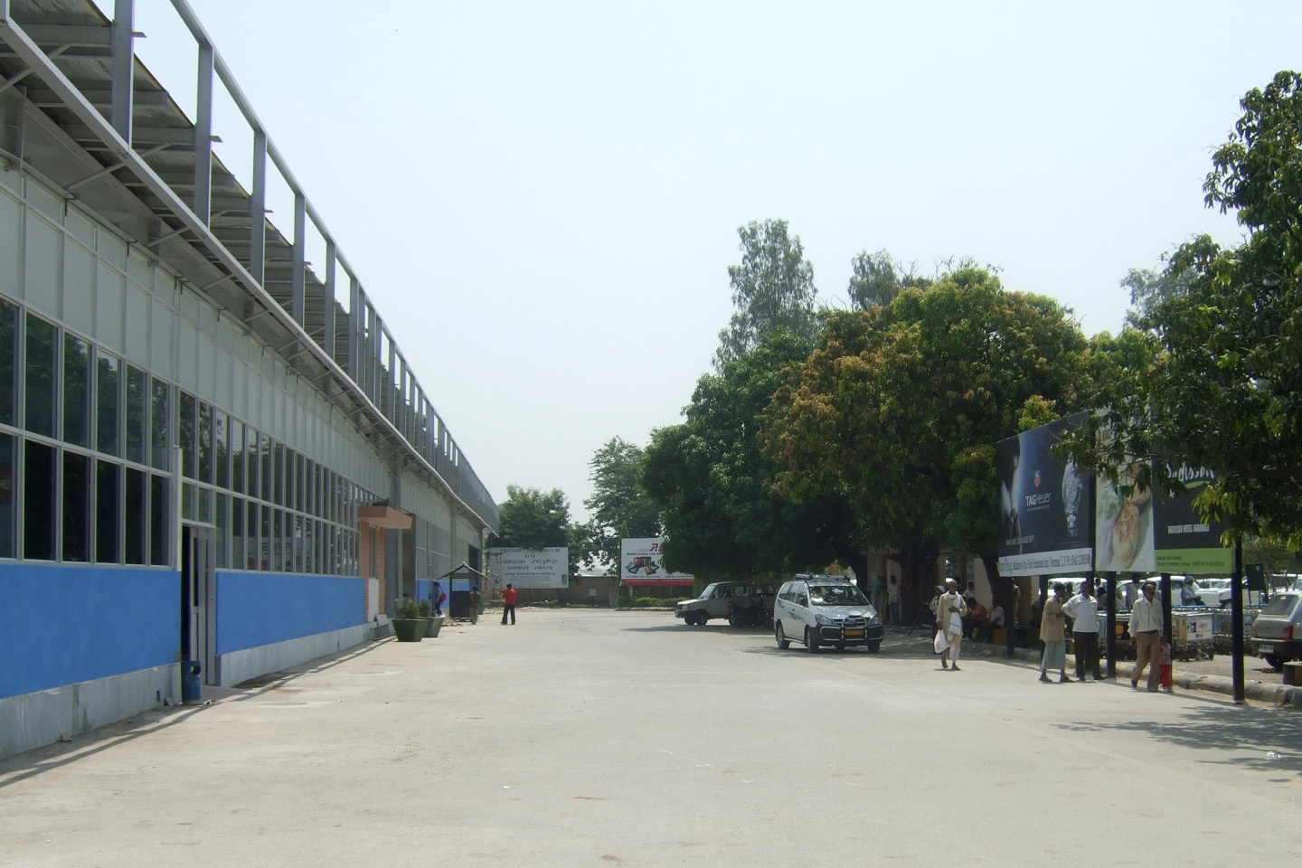 Varanasi Airport, India